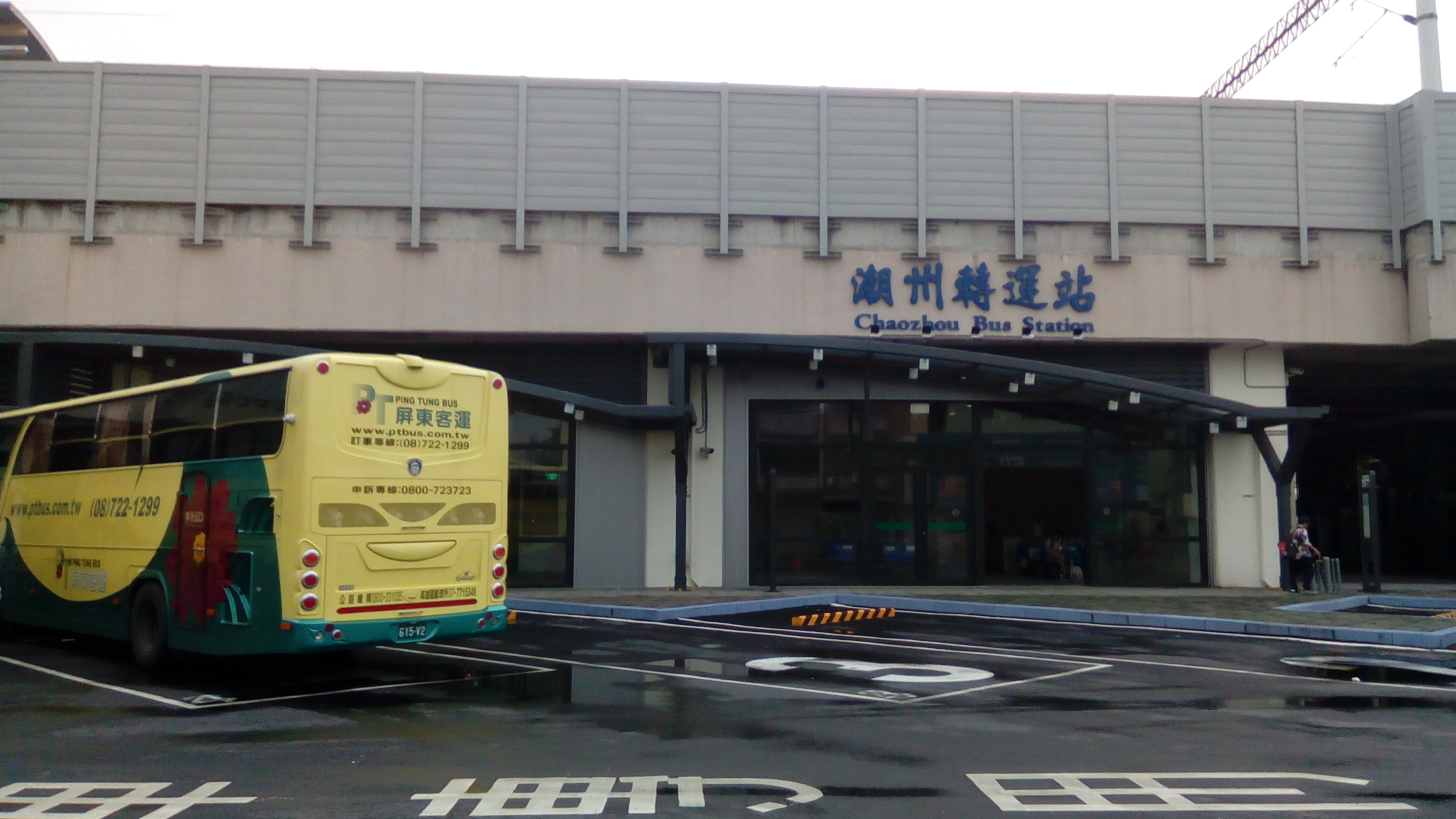 潮州車站高架化站體的一部分